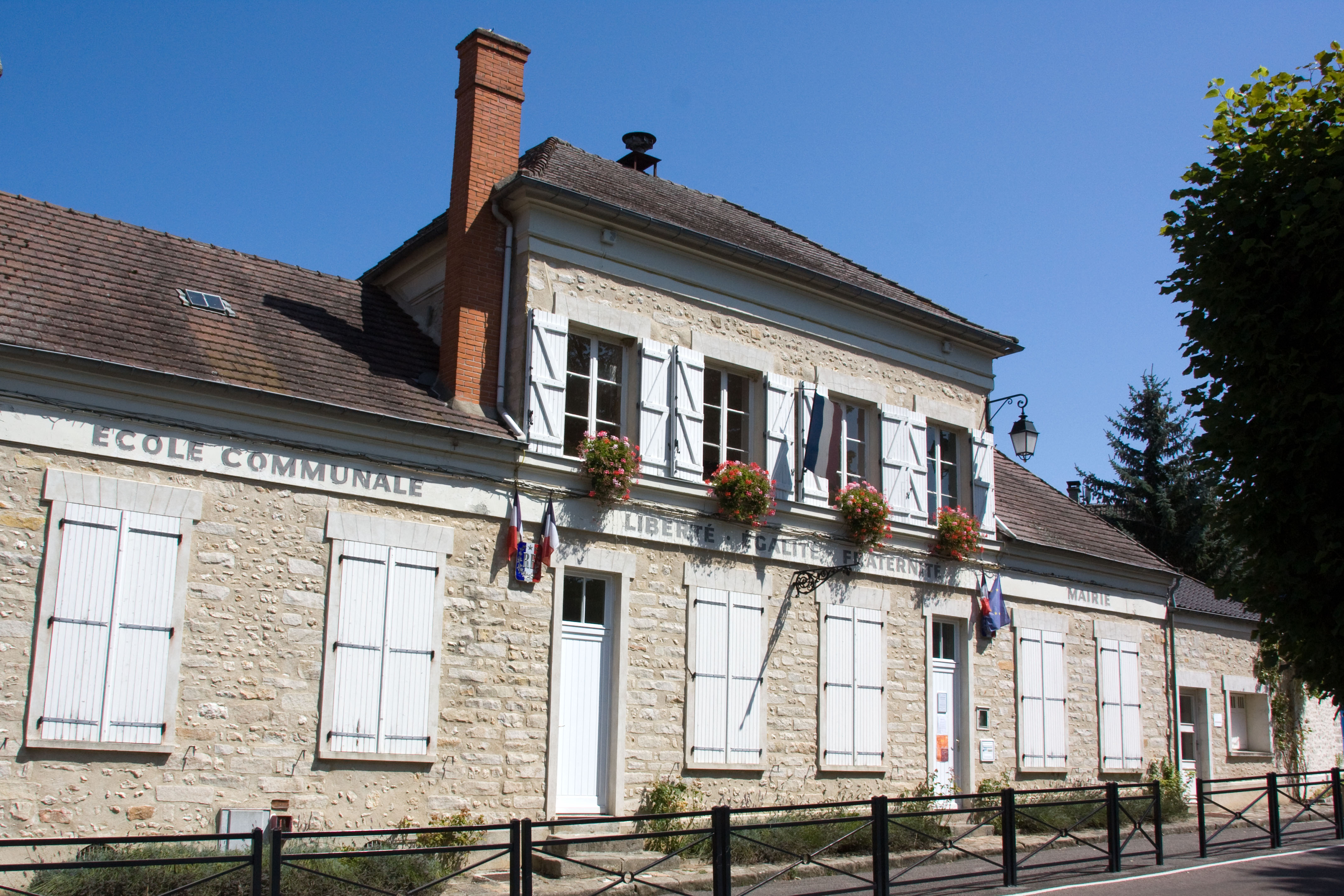 La mairie de Courances. Courances, Essonne, France